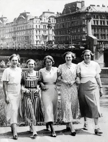 De Nederlandse zwemkampioenen in de straten van Wenen: v.l.n.r.: Jo Timmermans, Willy den Ouden, Trude Baumeister, Brouwers en Hogeweg. Wenen, 1934..